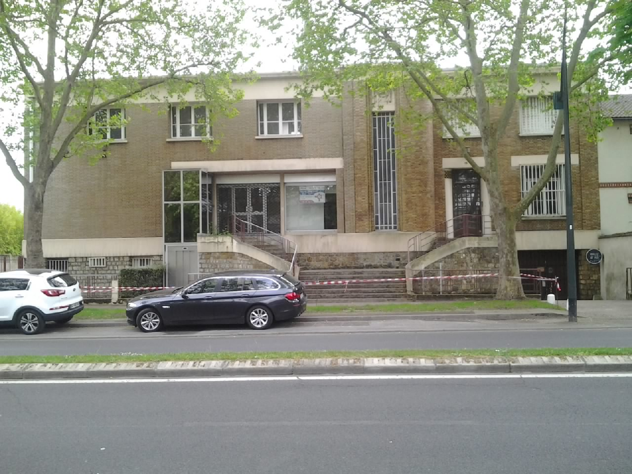 Central téléphonique Princesse - 27 boulevard Carnot - Le Vésinet (78) - 23 avril 2014.